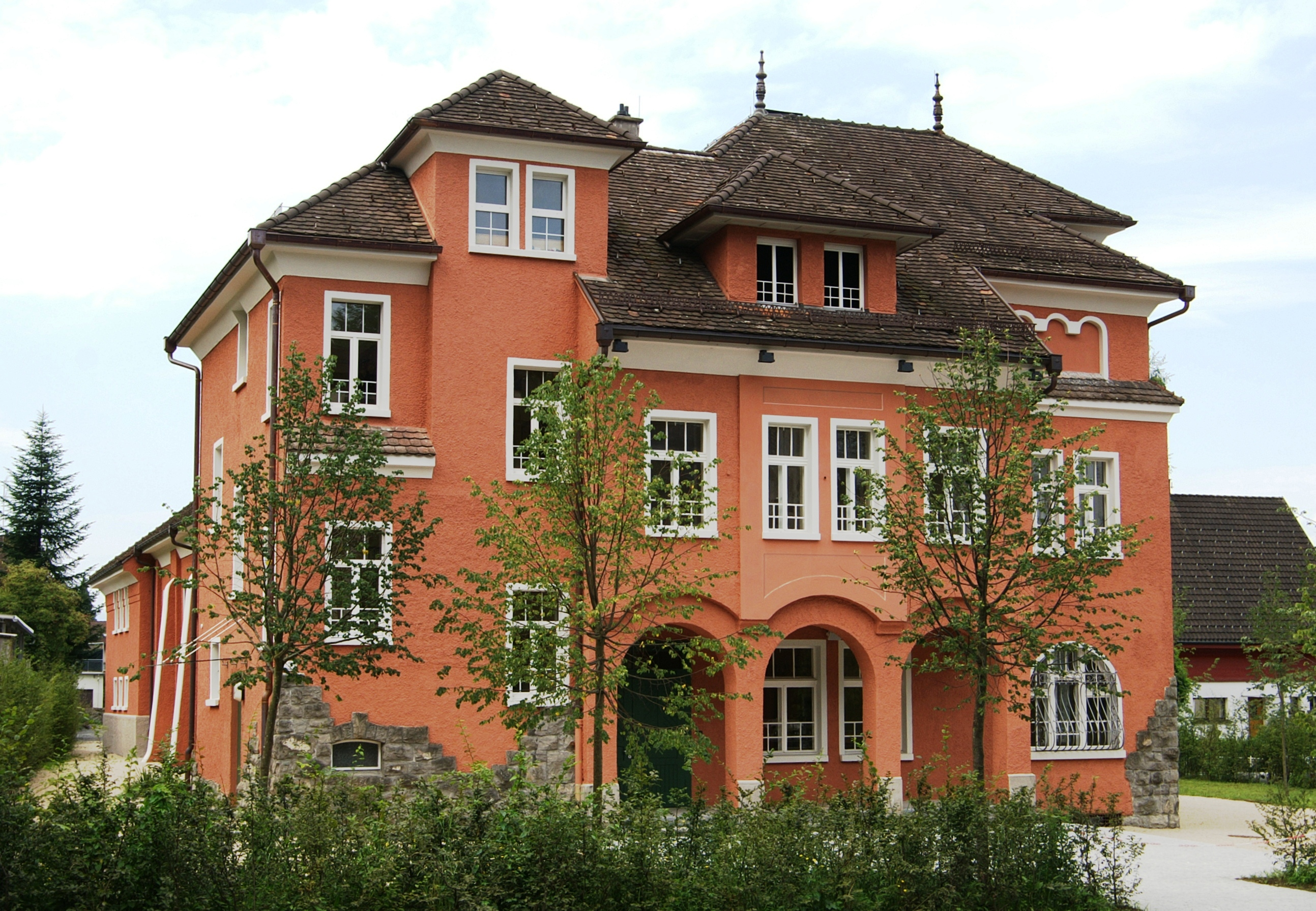 Turnhalle, Graf-Maximilian-Str. 3 in Hohenems. Auftraggeber: Turnverein Hohenems. Architekt: Hanns Kornberger Erbaut 1911 – 1913 / heute Markus-Sittikus-Saal. Das Objekt steht unter Denkmalschutz.